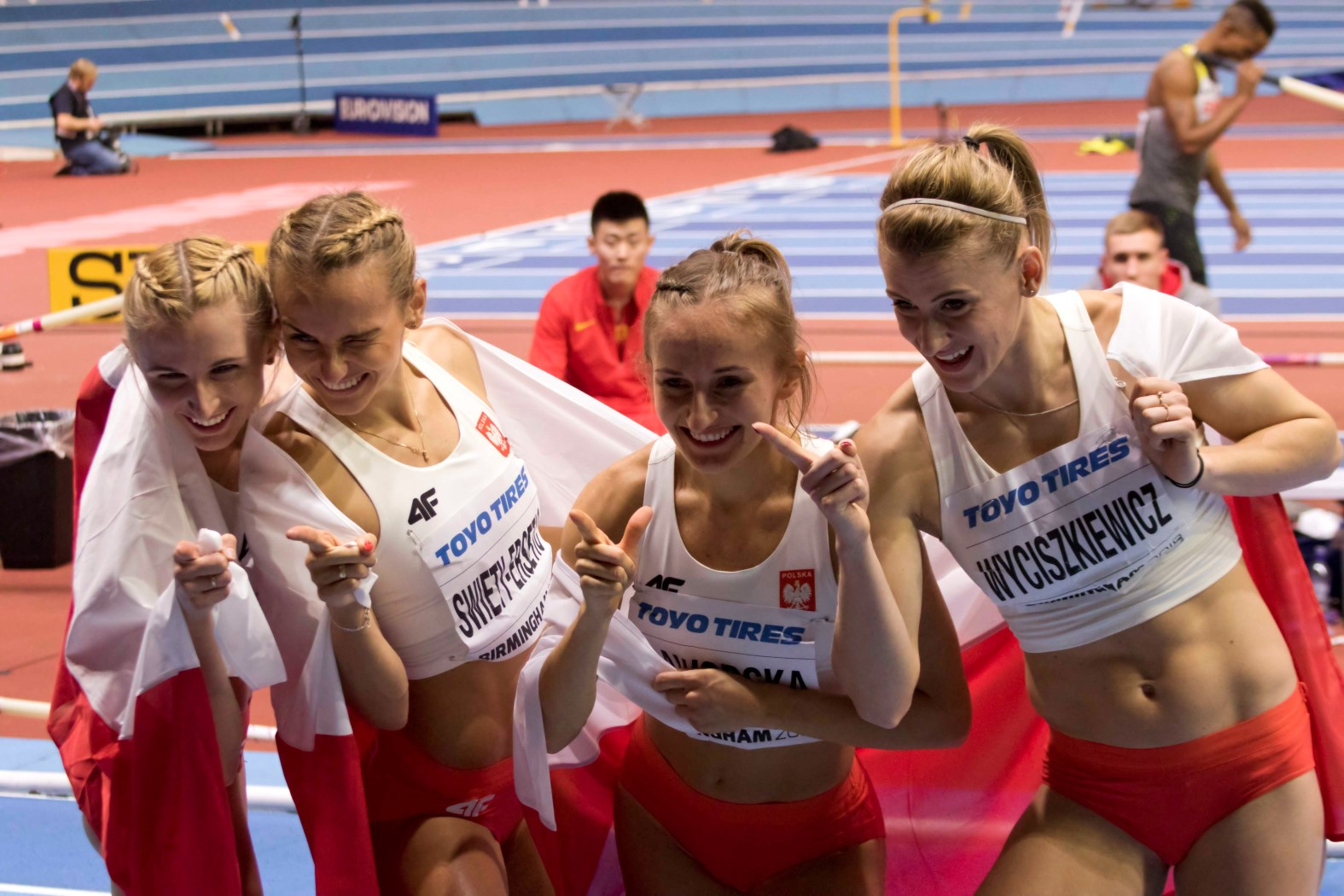 WK040206 pools 4x400m damesteam